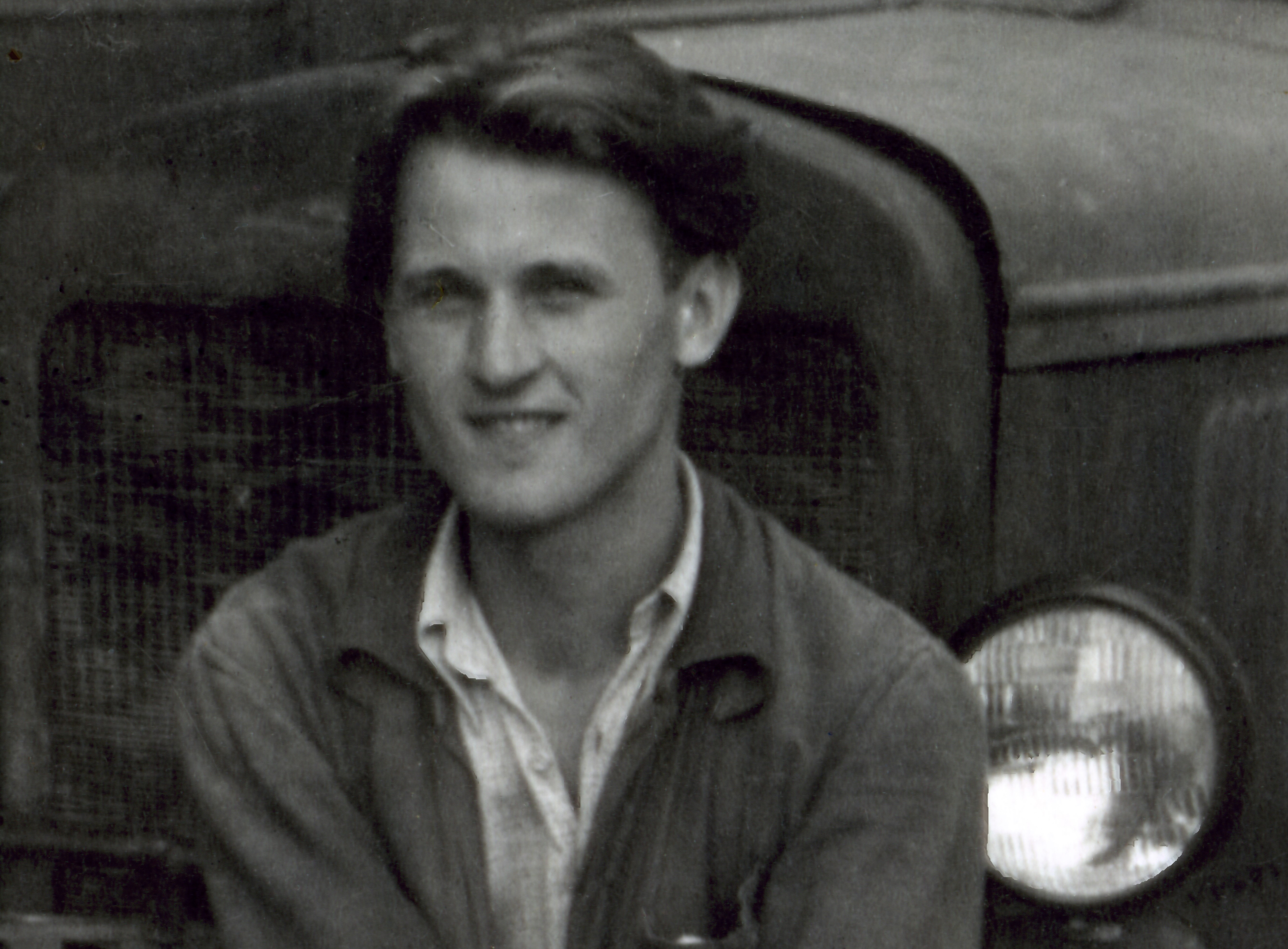 1948 m. atvykęs į Vilnių dirba sandelininku saldainių fabrike 1948 m. Vilniuje dirba sandelininku saldainių fabrike "Žibute". Gyvenimiškos patirtys fabrike atsispindi rašytojo romane "Saldaus gyvenimo klampynėse".